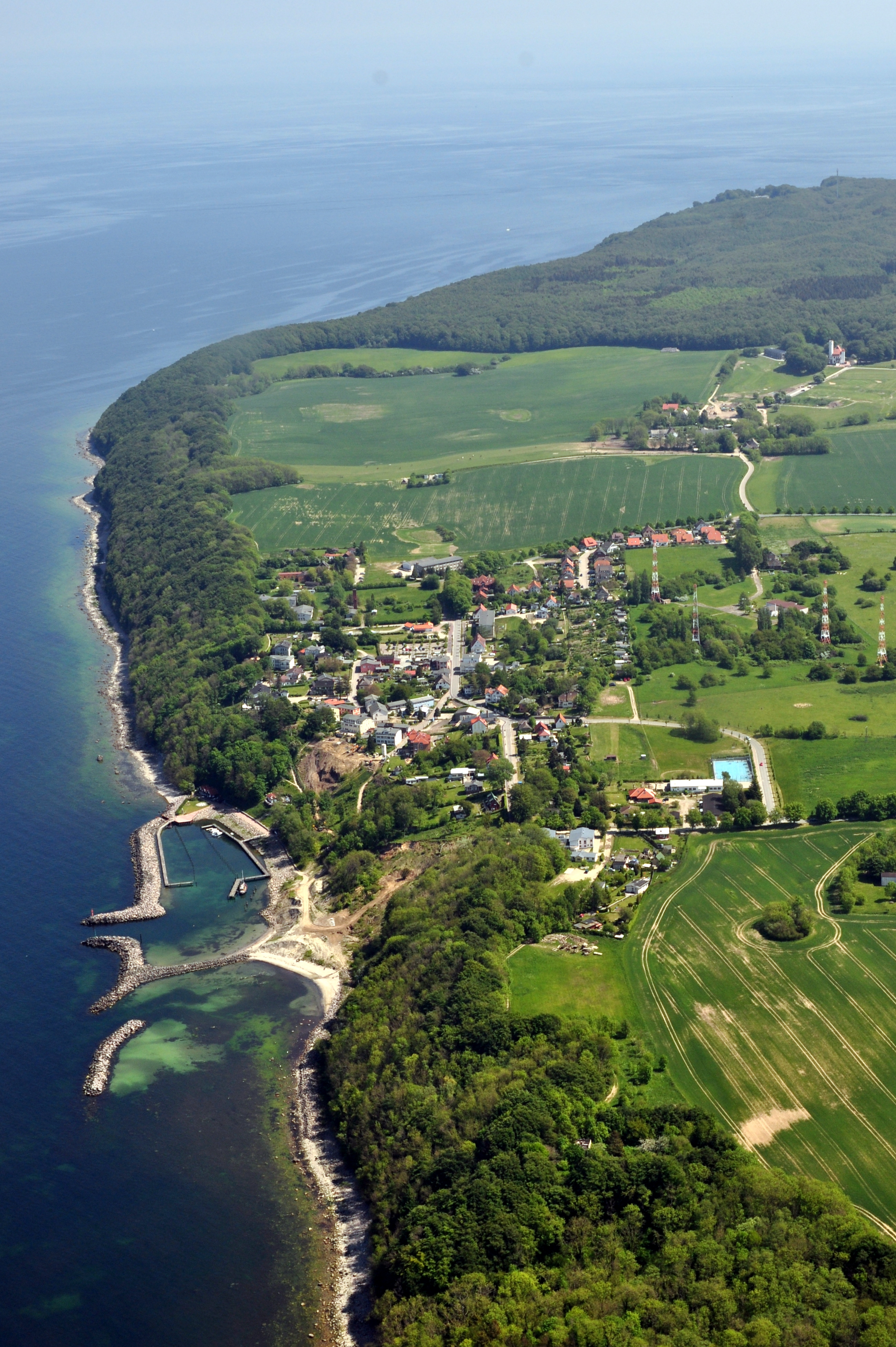 Die Bilder wurden von mir während eines einstündigen Rundflugs ab Flugplatz Güttin am 21. Mai 2011 aufgenommen. Die Bildbeschreibung steht im Dateinamen. Aufgenommen mit einer Nikon D5000 durch das Seitenfenster des Flugzeugs.